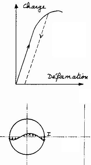 écrouissage et préconformation Dessin original de Jean-Jacques MILAN, reproduction libre